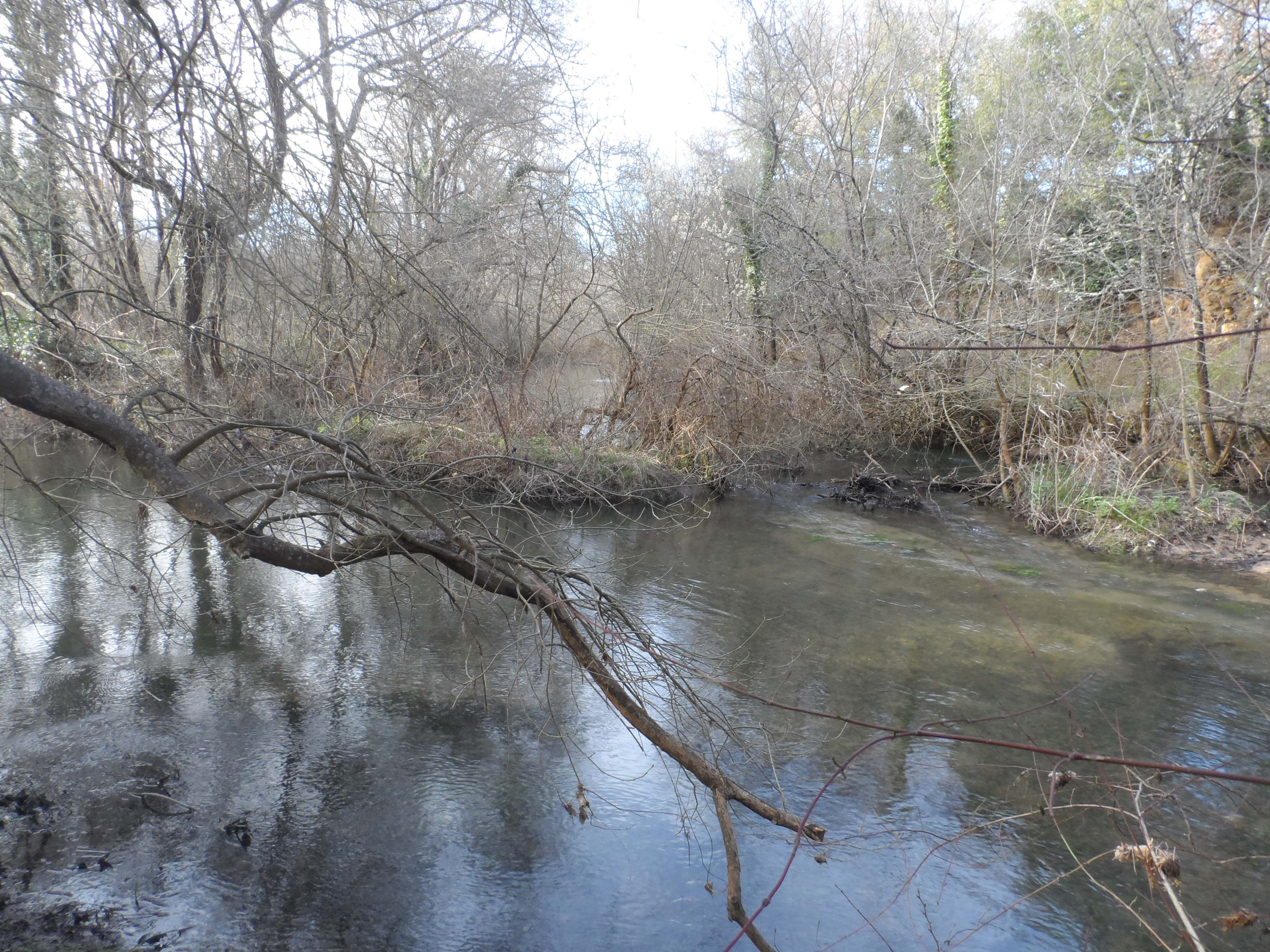 Embouchure de la Meyronne dans l'Argens